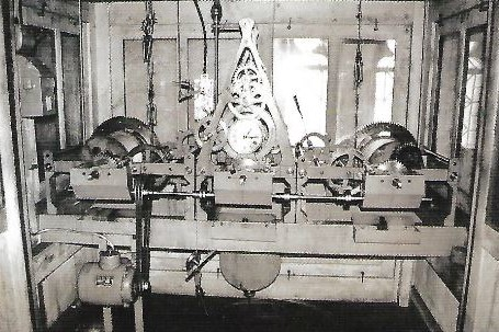 Es ist das Alte Uhrwerk der Kirchturmuhr der Stadtpfarrkirche in Waibstadt zu sehen